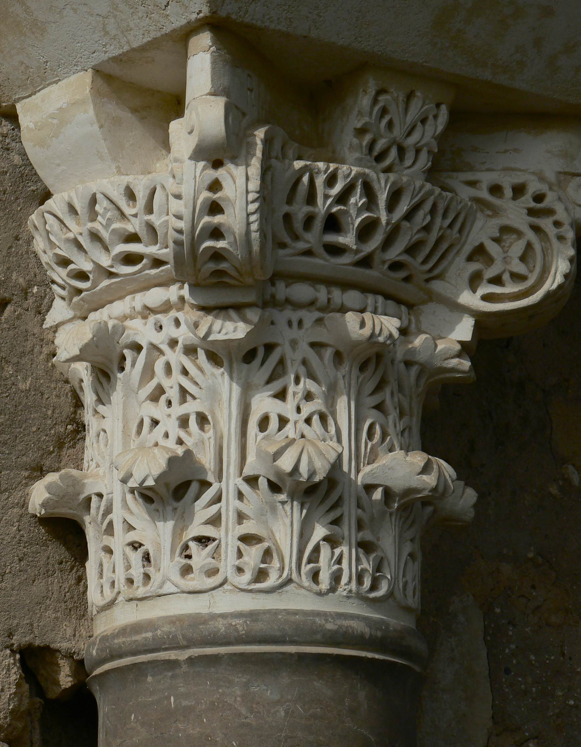 Capitel de Medina Azahara en Córdoba (España).